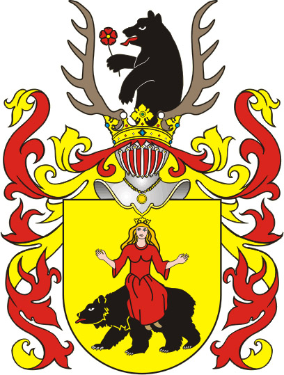 Rawicz (Rawa) Coat of Arms